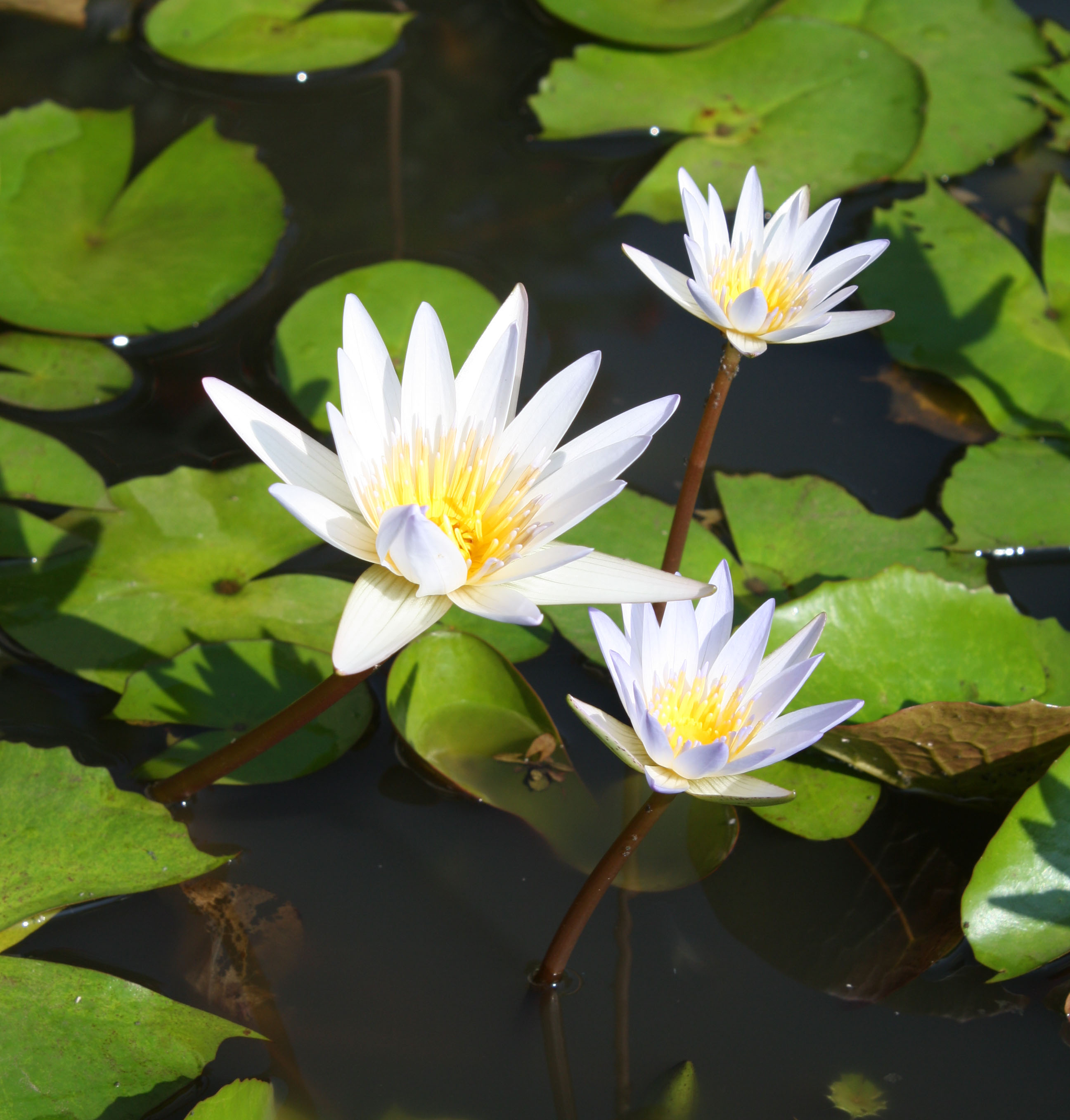 Bunga Teratai